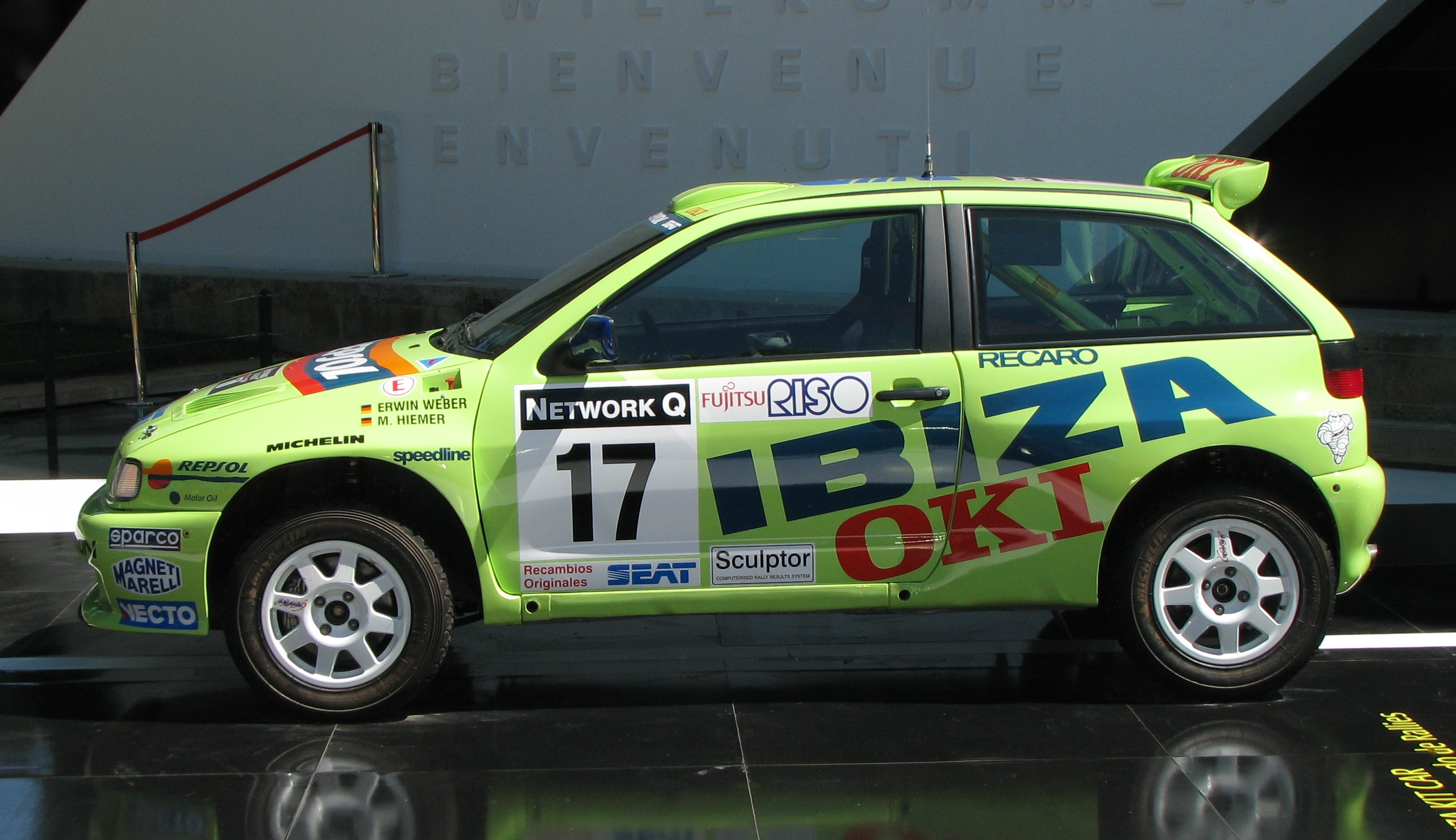 Seat Ibiza Kit Car en el Salón Internacional del Automóvil de Barcelona 2009. Campeón del mundo FIA 2L de 1996, campeón de la Copa del Mundo de 2L en 1997 y 1998.